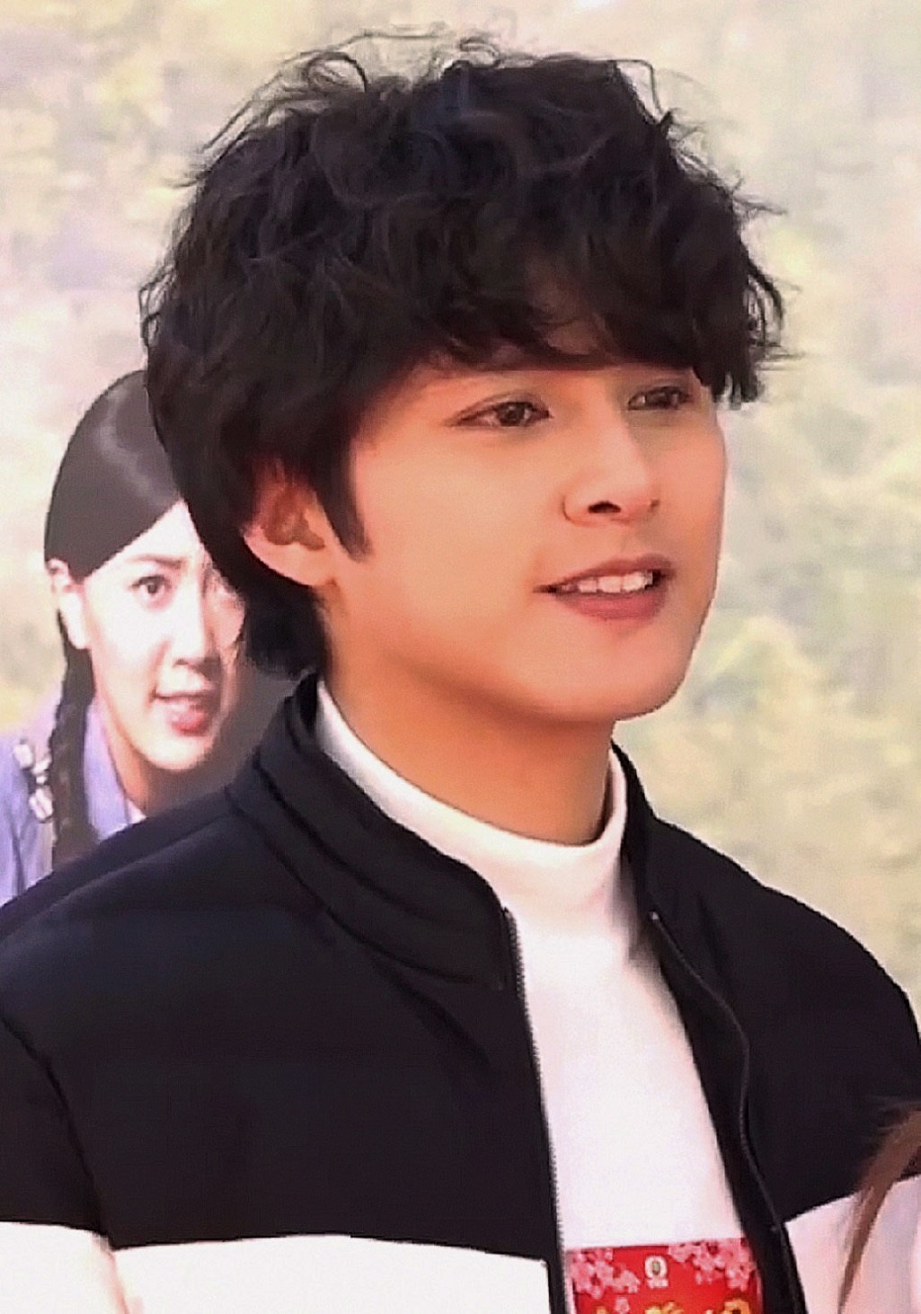 中文（香港）: 《大醬園》之「大戶人家過新年」記者會